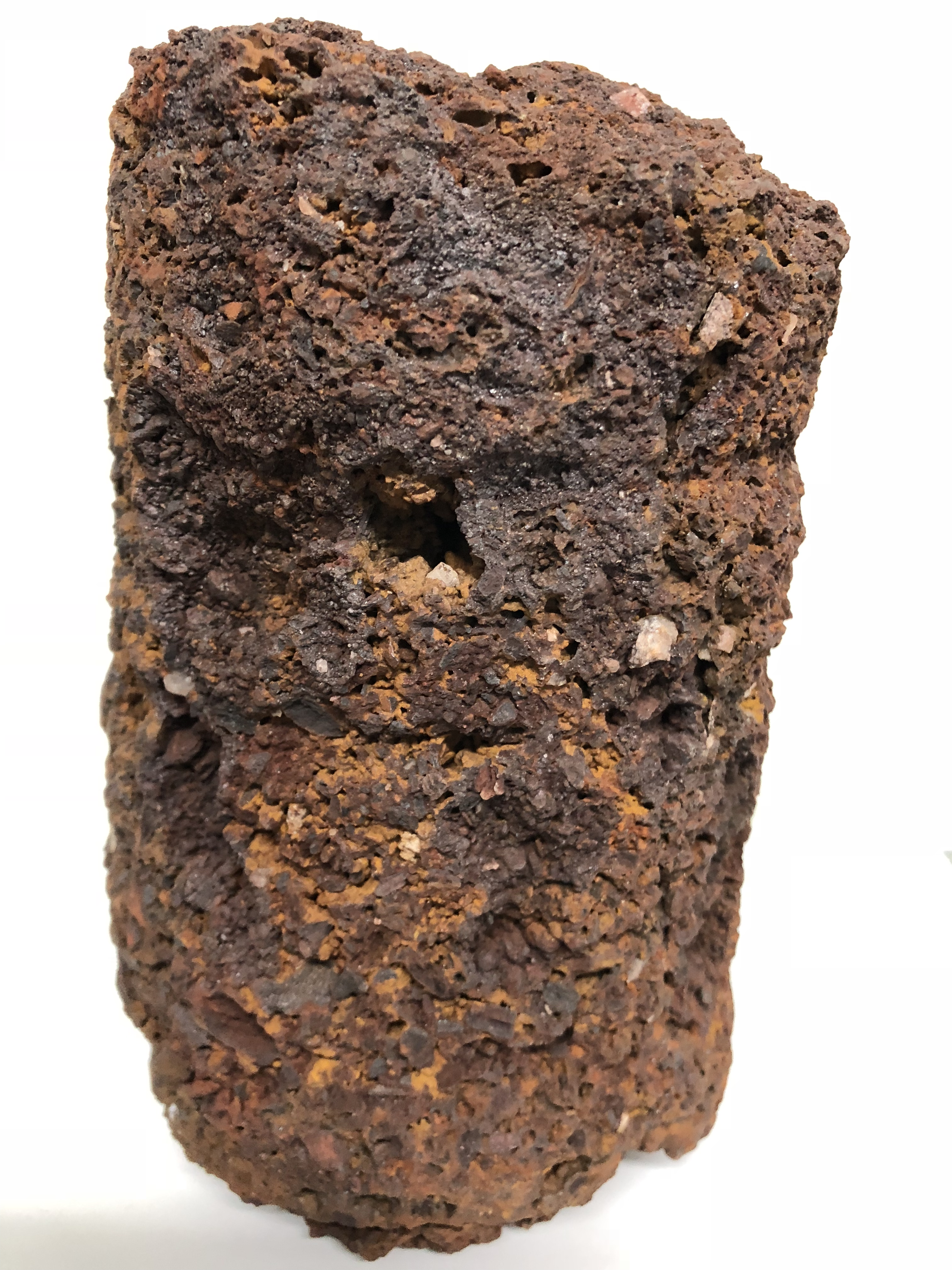 Amostra de canga de minério de ferro